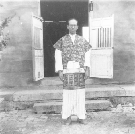 岸裡社的服裝 攝影地點:台中州豐原郡